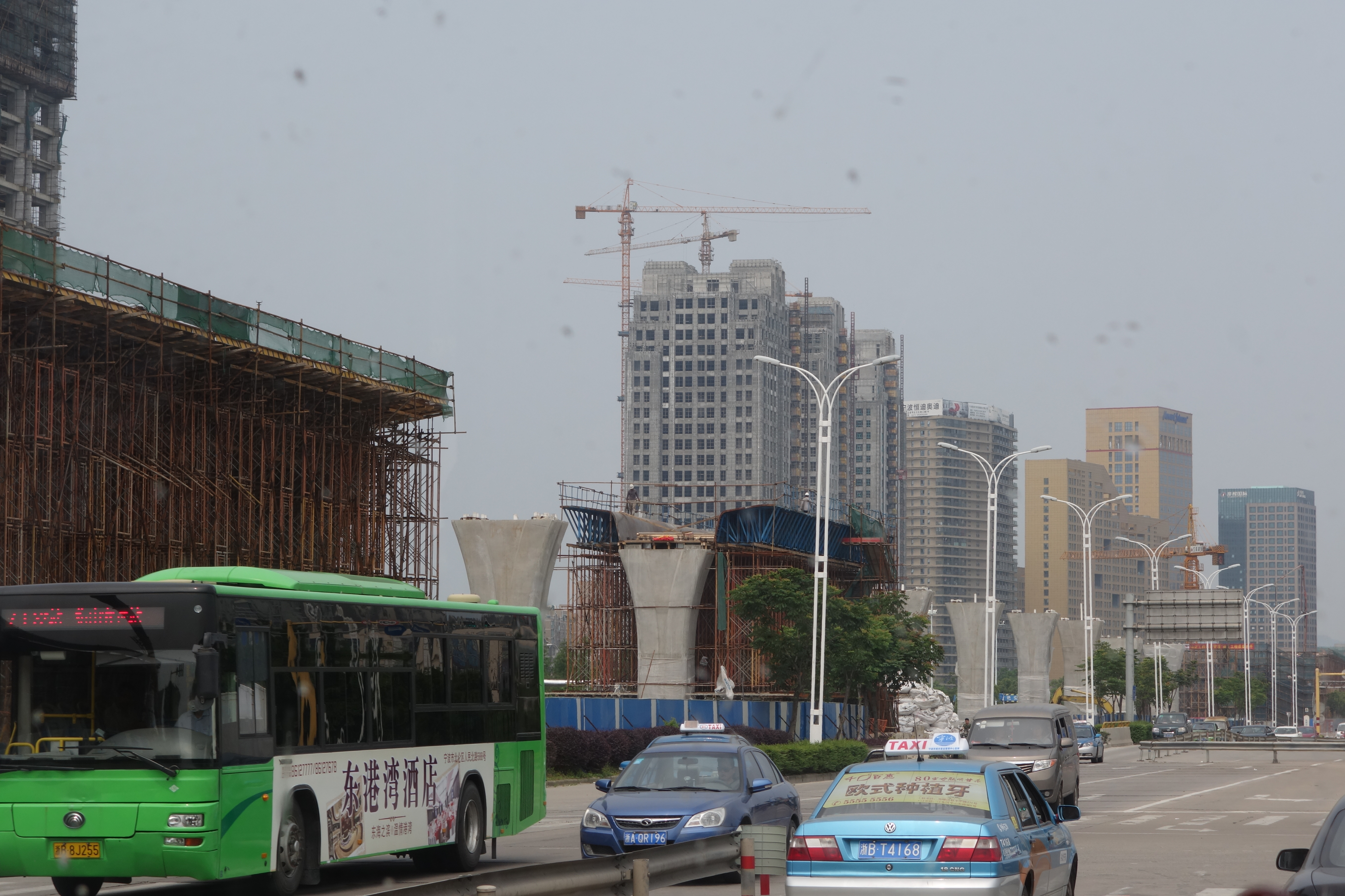 宁波轨道交通1号线二期长江路站附近工地